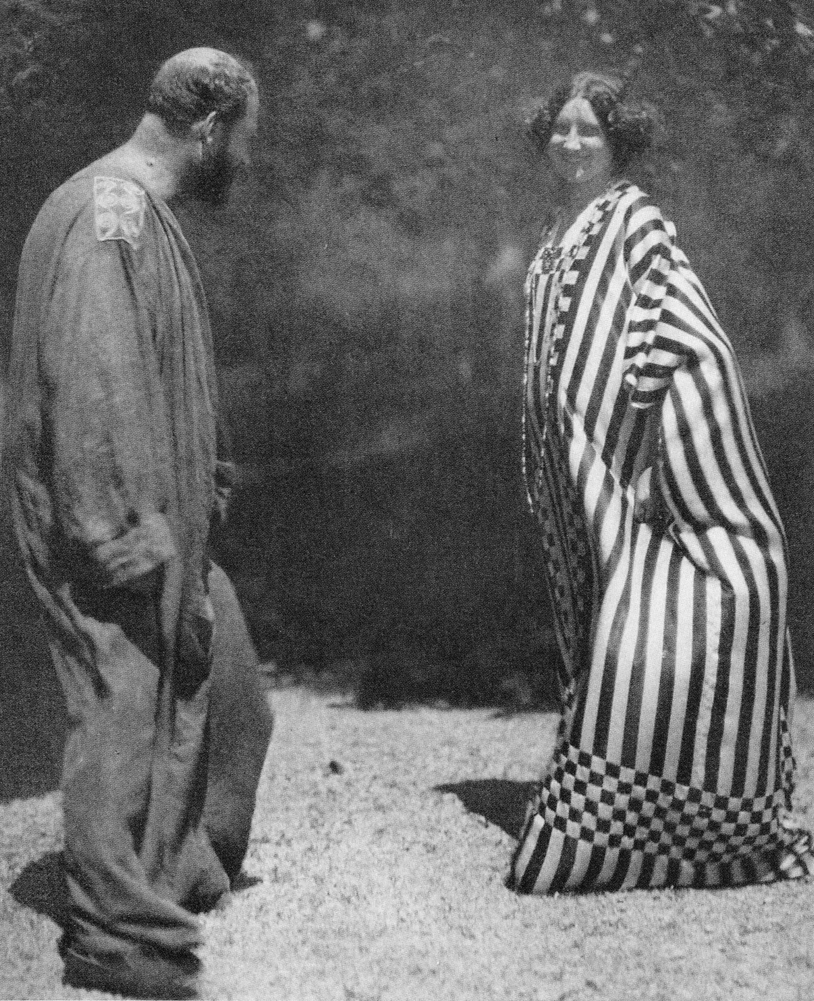 Aufnahme auf einem Grundstück an der Straße Kammer in Schörfling am Attersee